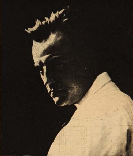 Carlos Wiedner caricaturista chileno de inicios del siglo XX.